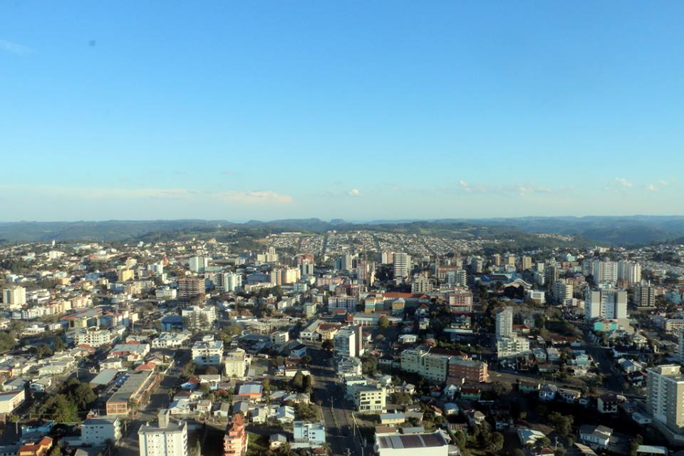 Faroupilhavista